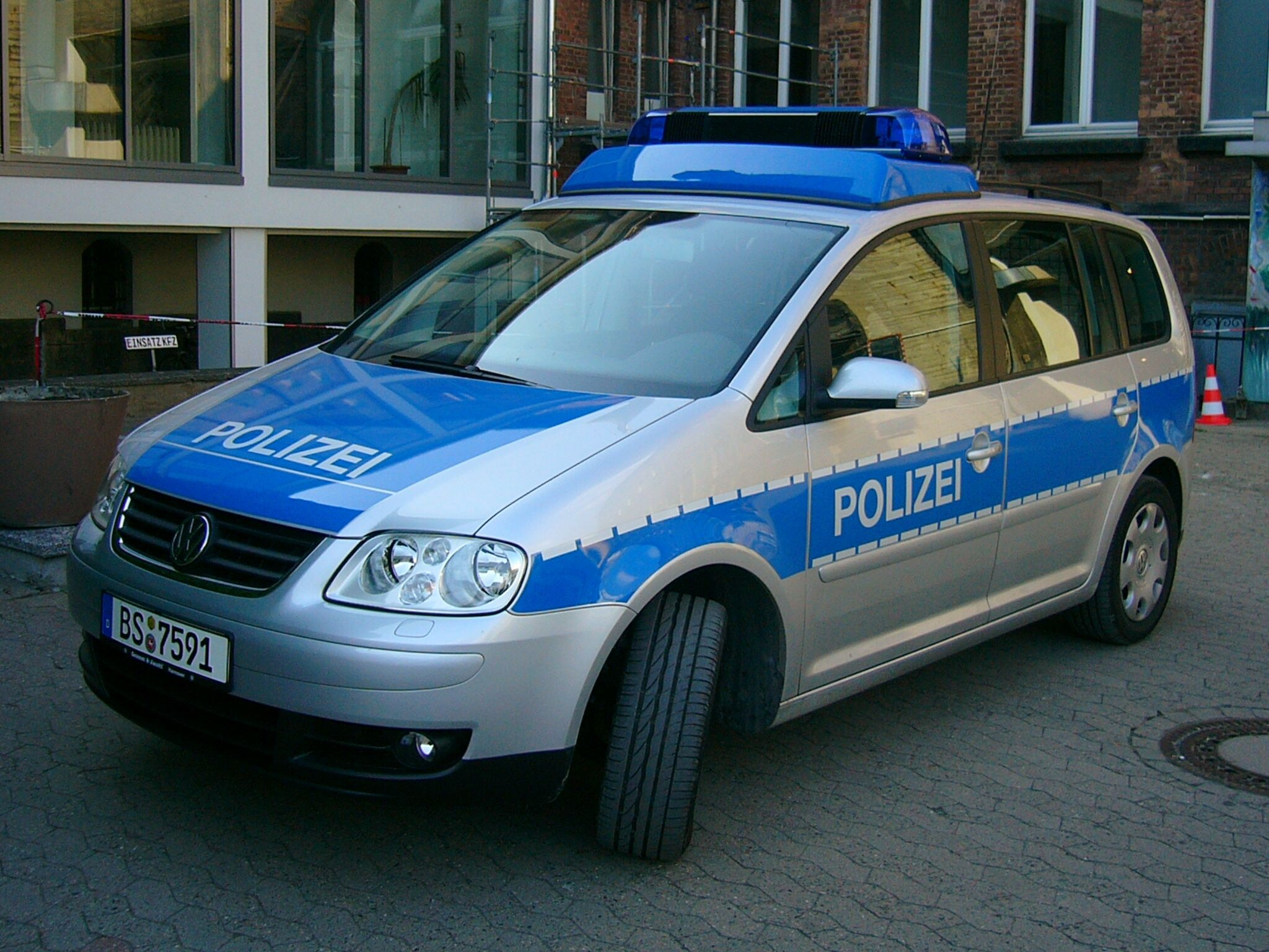 Einsatzfahrzeug der Niedersächsischen Polizei (Polizeidirektion Braunschweig)